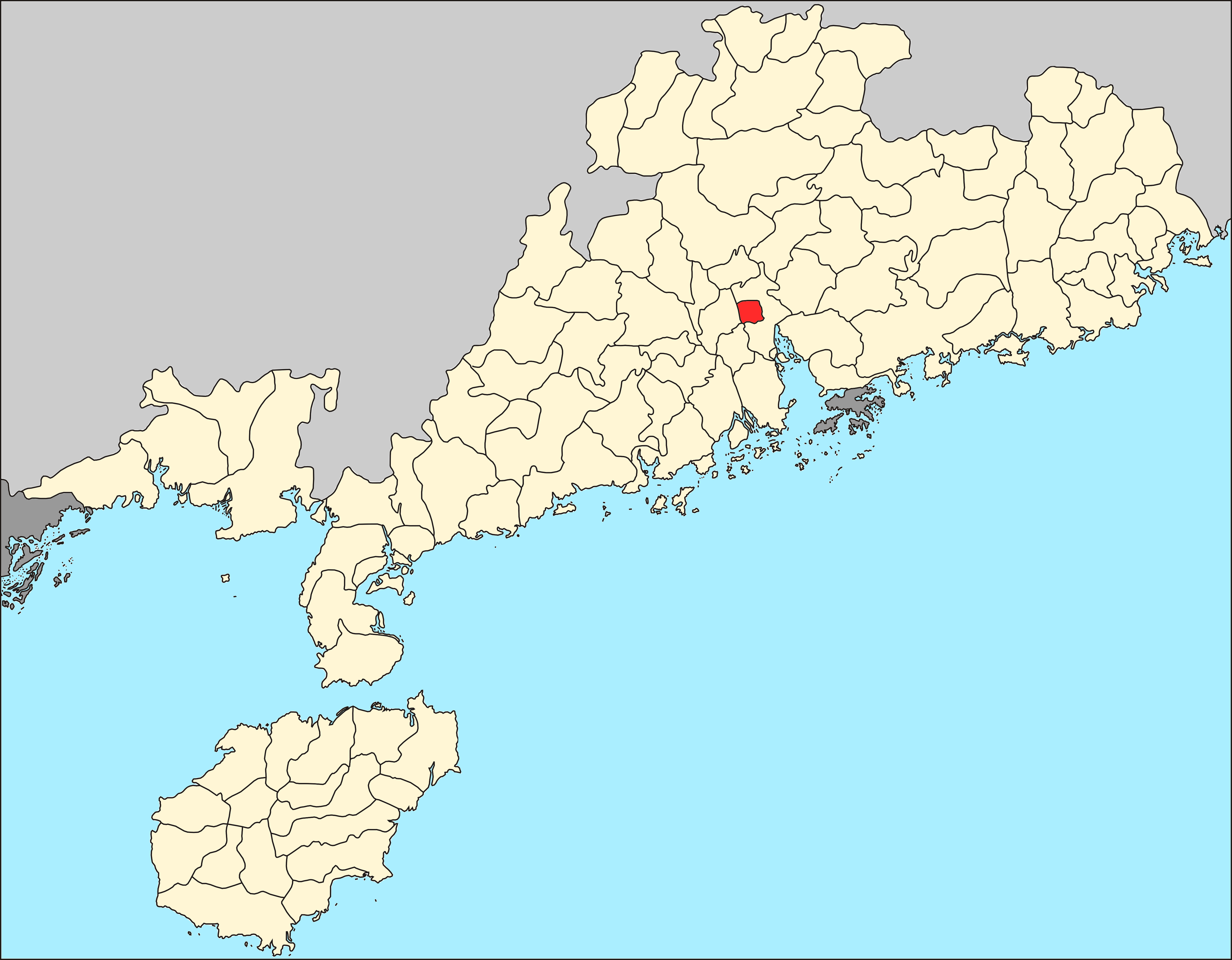 中文（中国大陆）: 1946年广州市位置图